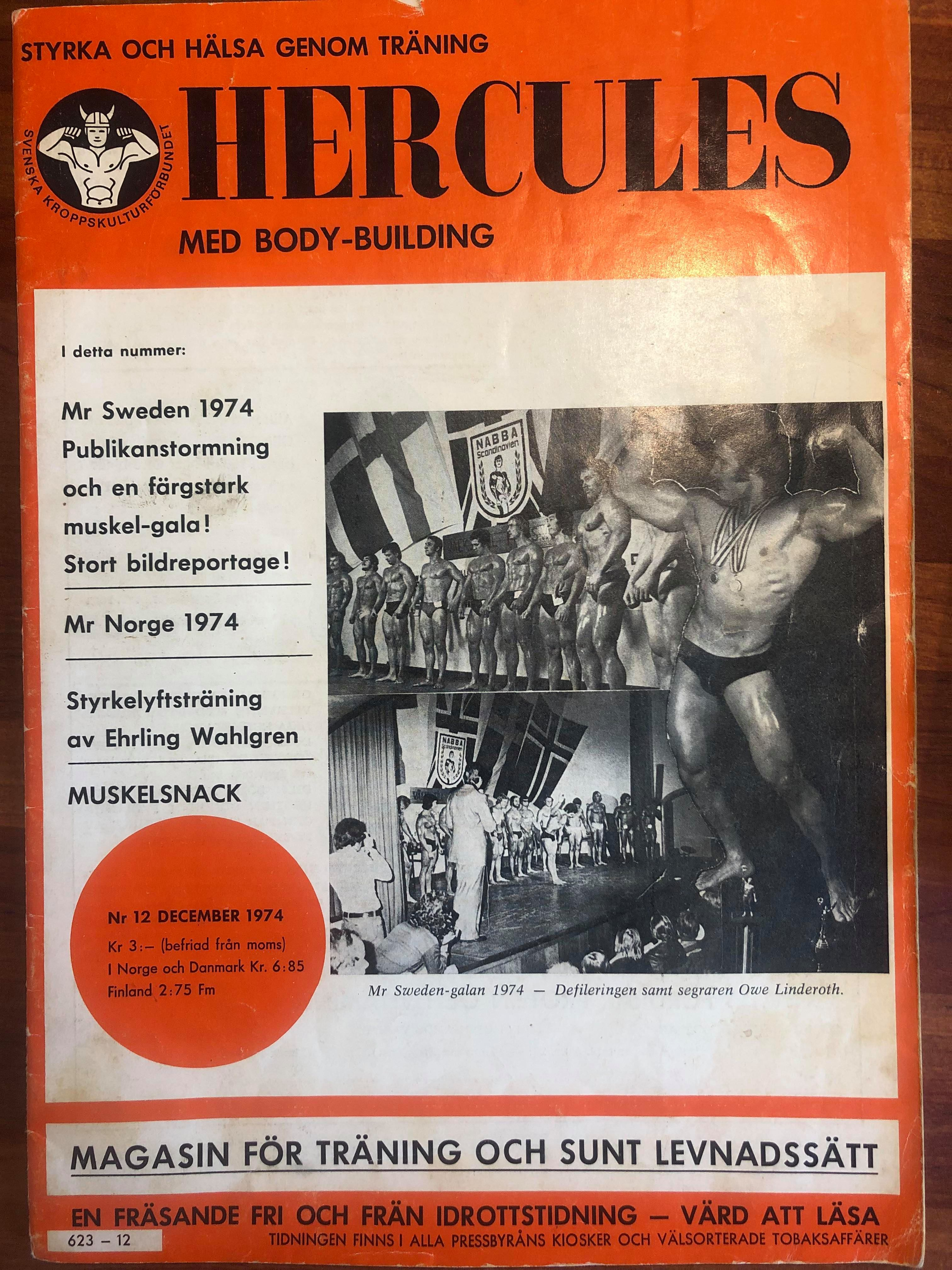 Artikkel fra Svenska Kroppskulturforbundet 1974. Utgave nr 12 løpenr: 623-12